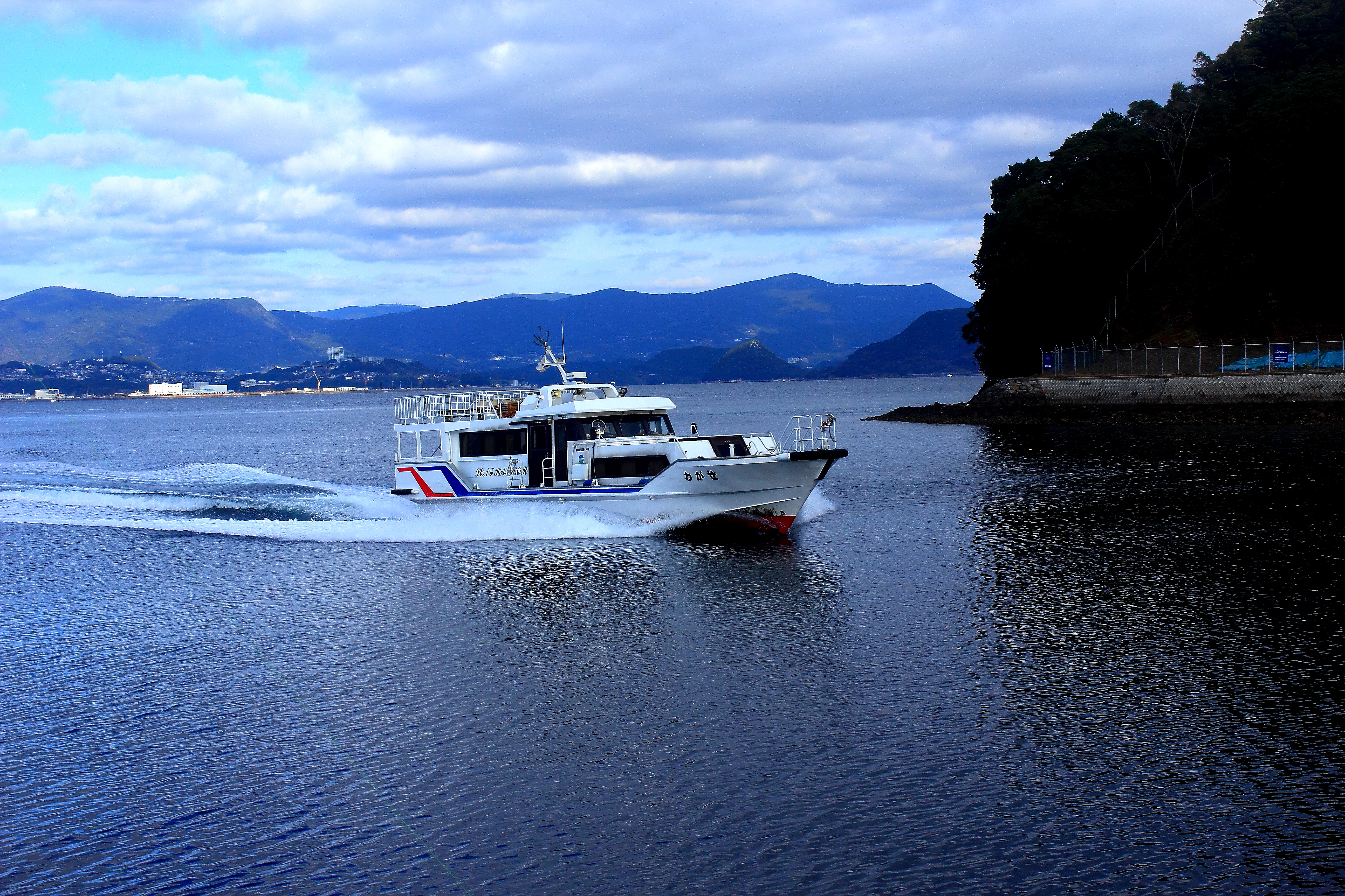 路線2 : 佐世保港 - 横瀬西港を15分で結ぶ せがわ丸 Canon EOS 60D